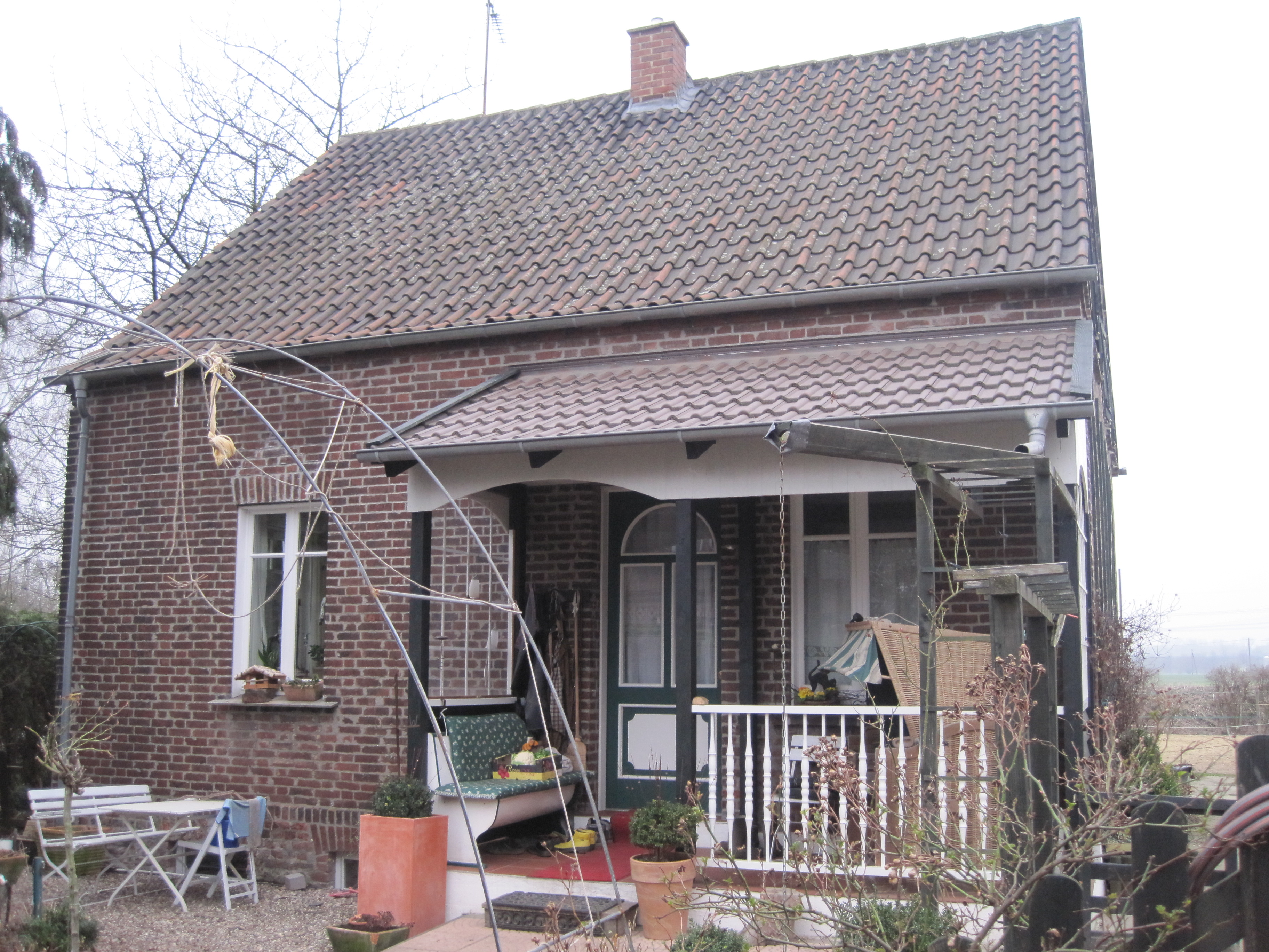 Das Foto zeigt ein Gebäude des Klosterhofes Bockum-Hövel, Hamm/Westfalen.